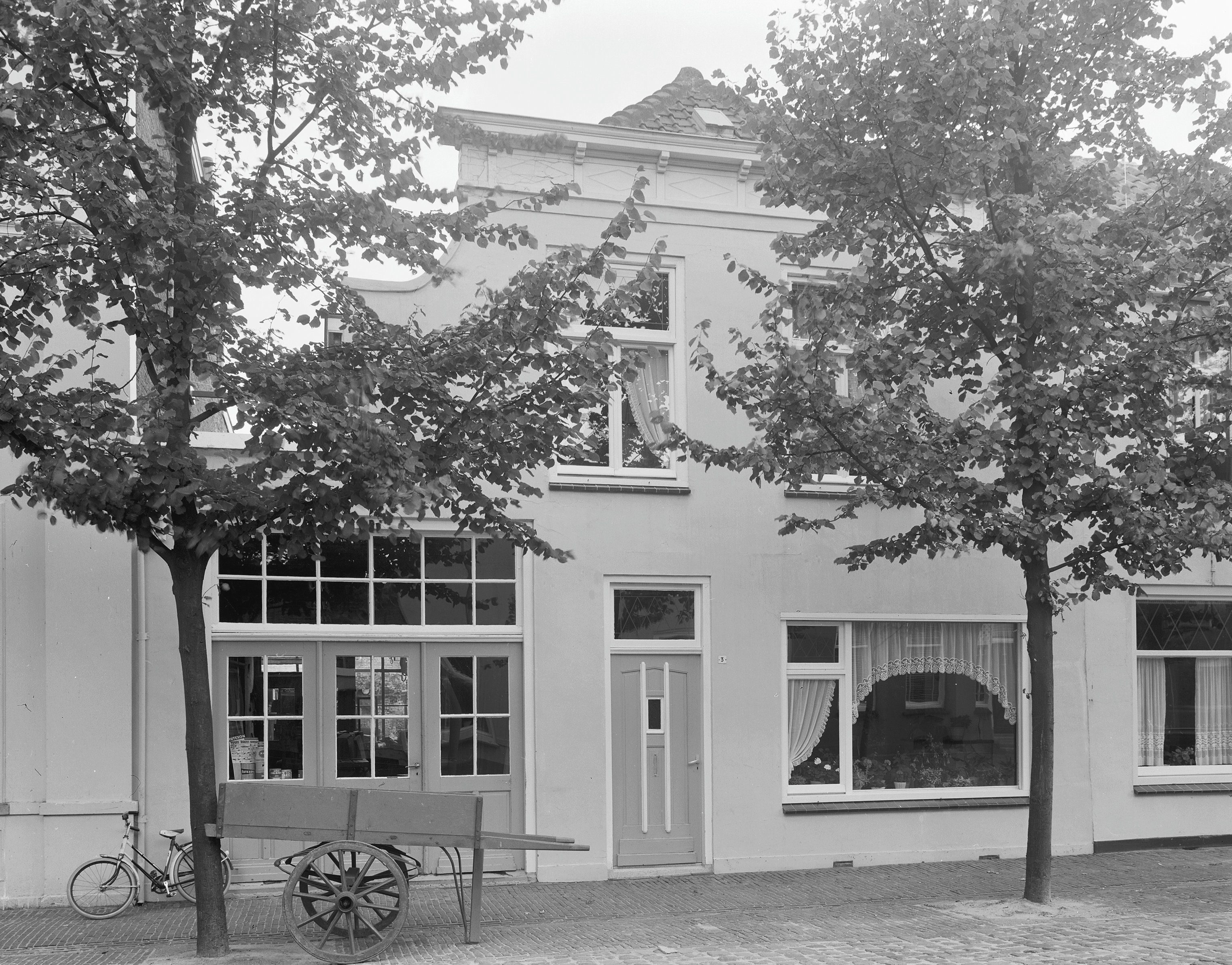 voorgevel